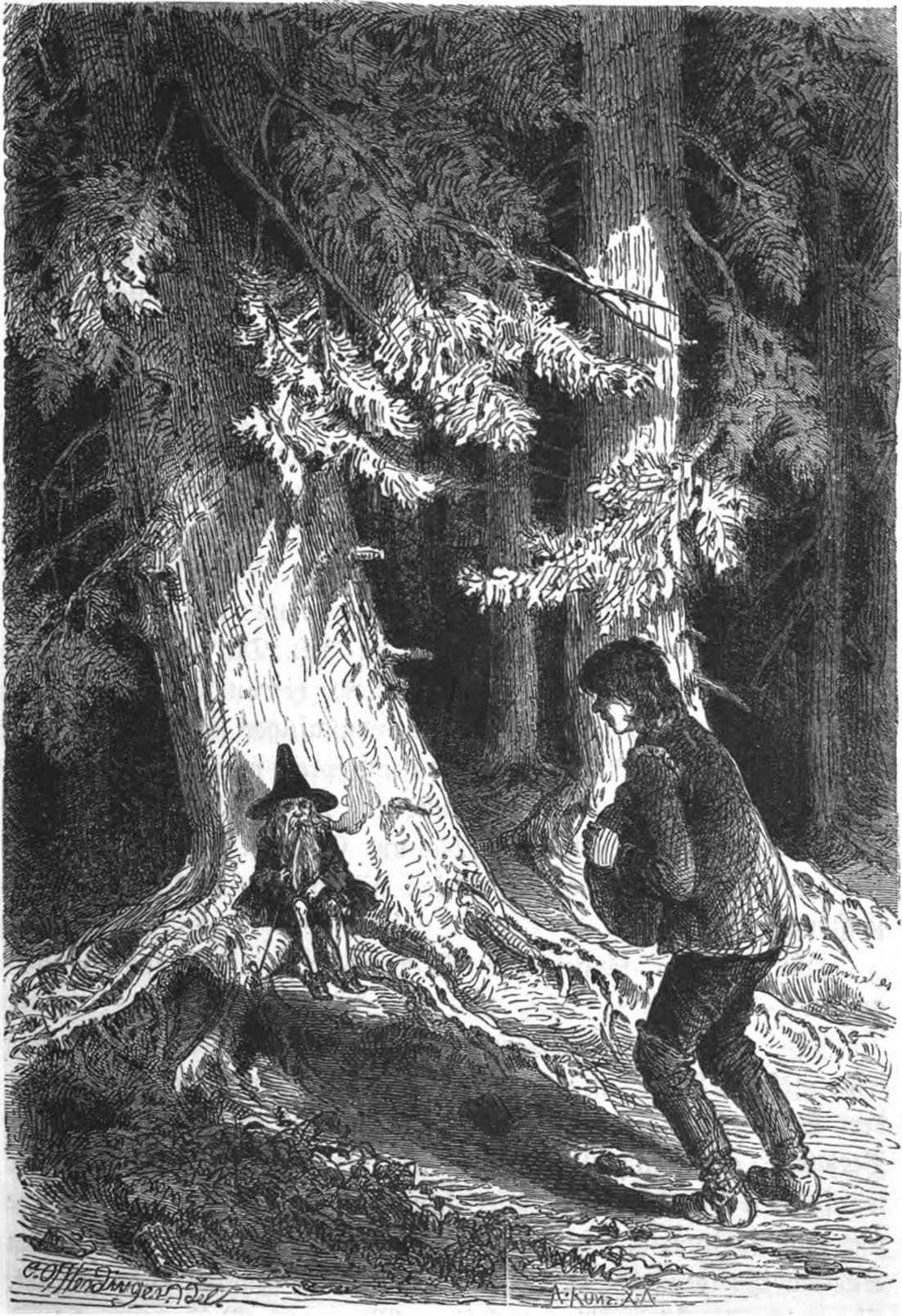 Szene aus dem Märchen Das kalte Herz von Wilhelm Hauff: Der Köhler Peter beschwört das Glasmännlein